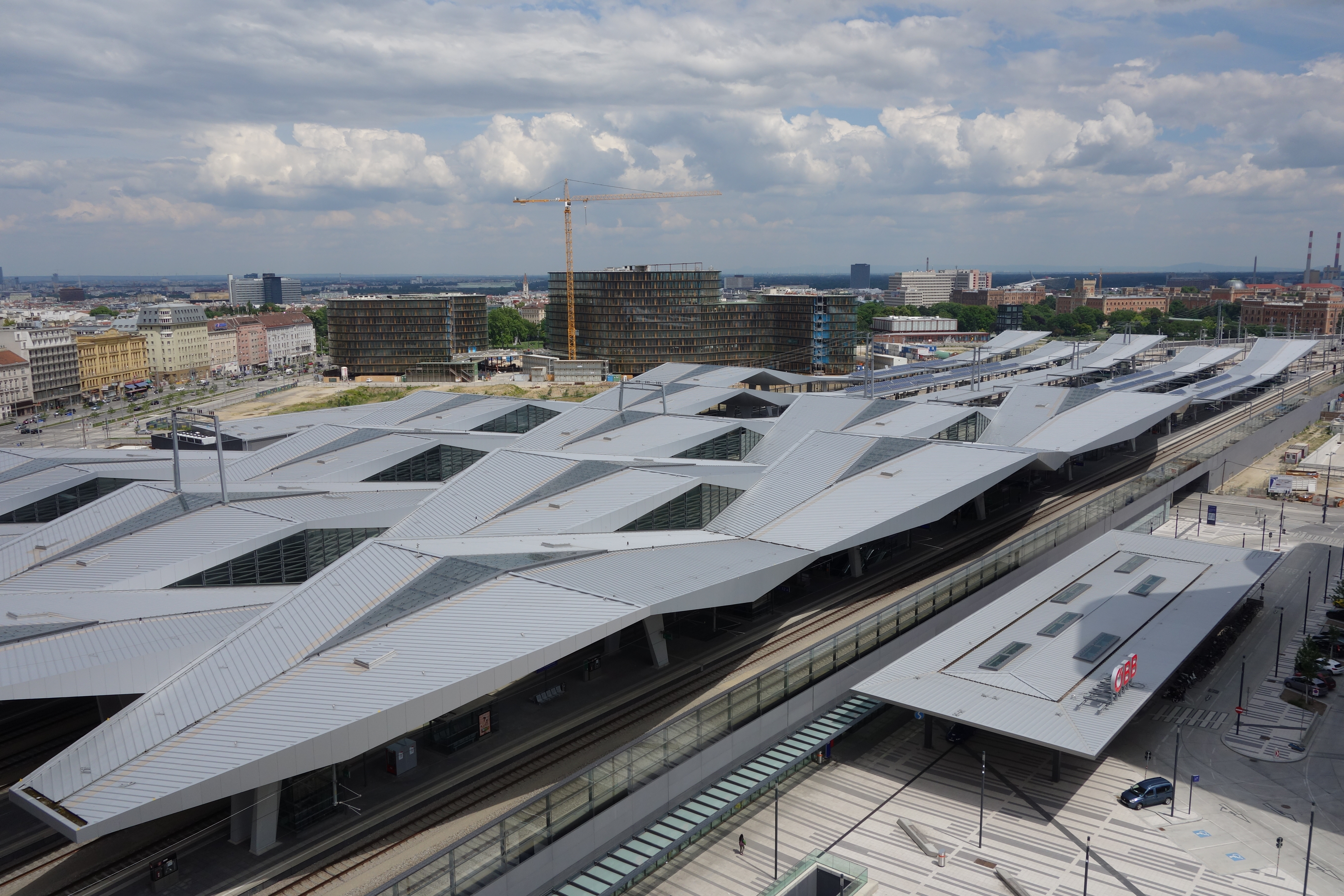 Der Wiener Hauptbahnhof und Vorplatz Süd im Juni 2014. Im Hintergrund der in Bau befindliche Erste Campus an dessen Stelle bis 2009 der Wiener Südbahnhof stand. Die Aufnahme entstand vom Aussichtsturm Bahnorama.